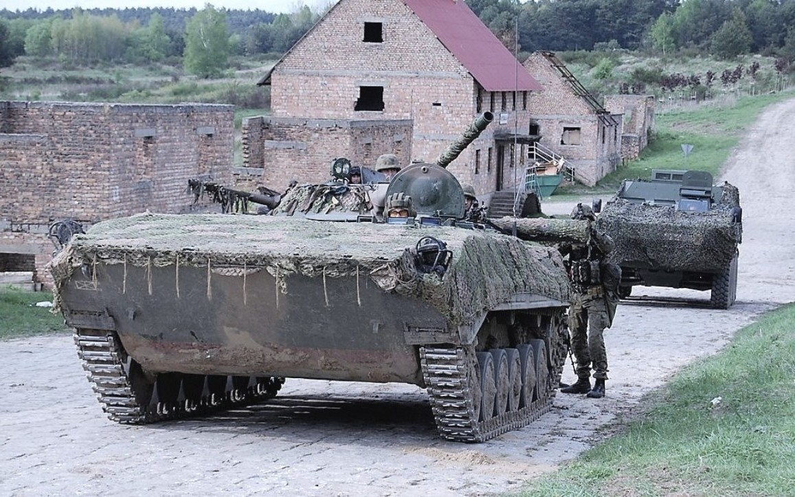 Żołnierze kompani 2bzmot na BWP-1